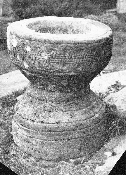 Dopfunt, medeltida. Kategori: (04) DopfuntarDopfunt, medeltida.